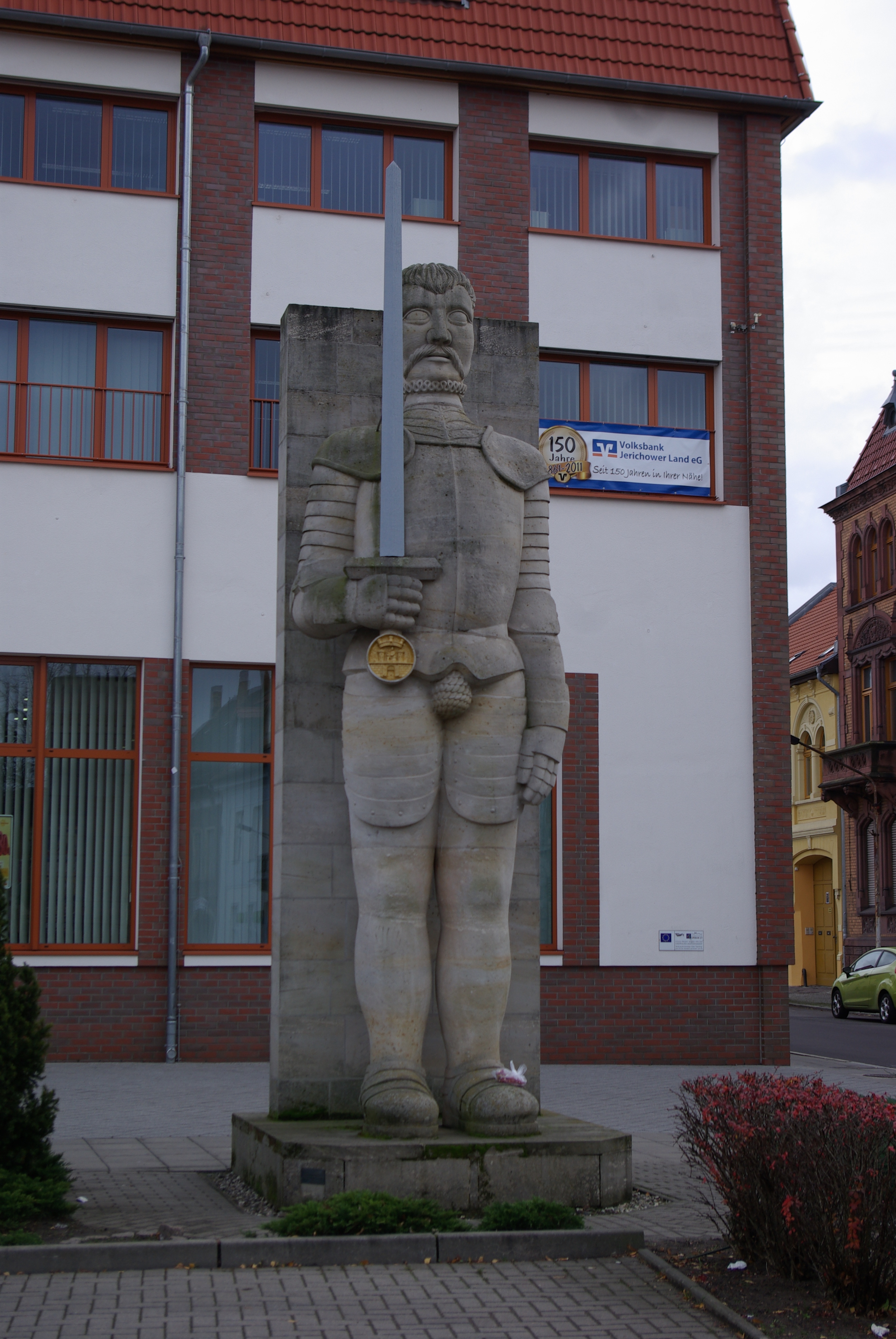 Burg in Sachsen-Anhalt. Der Roland steht auf dem Marktplatz.